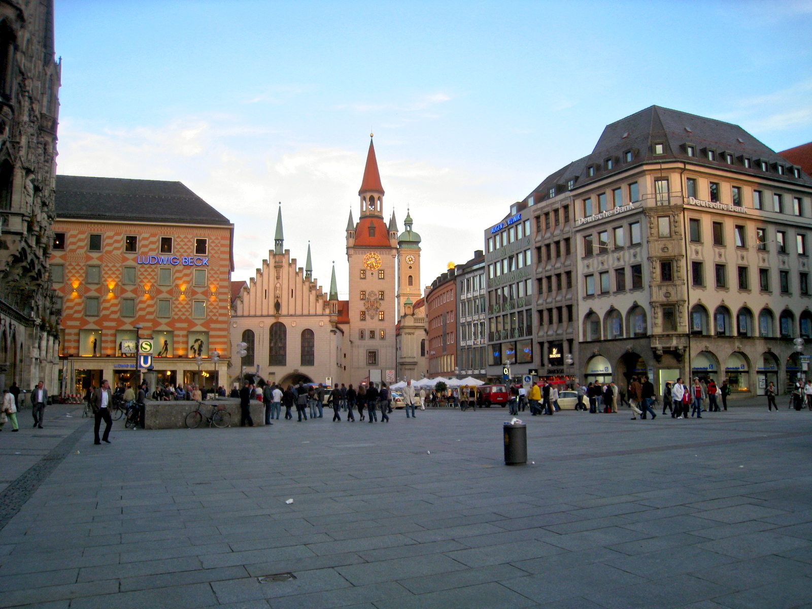 Marienplatz Buildings